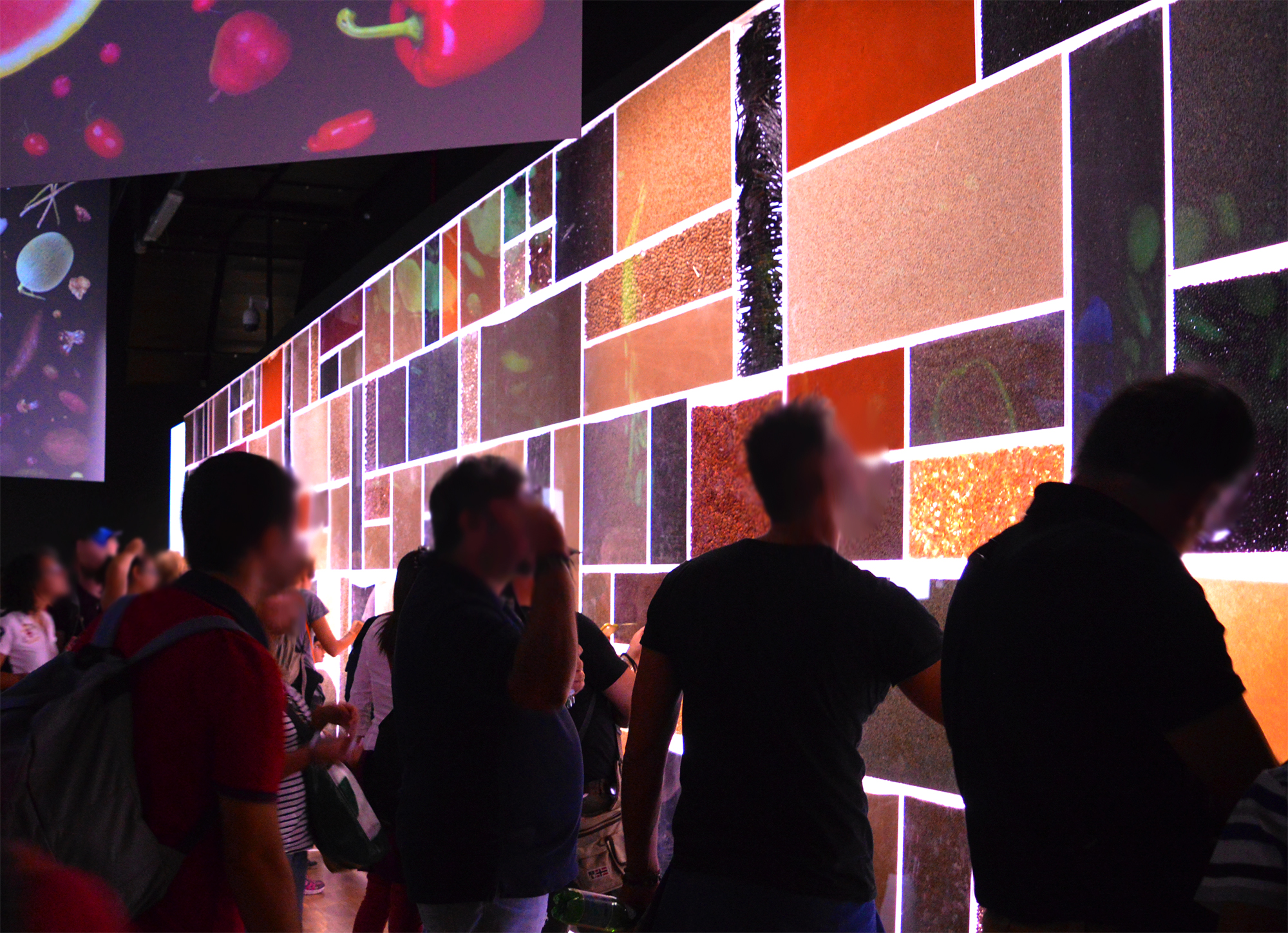 La sala dei semi al Padiglione Zero di EXPO Milano 2015